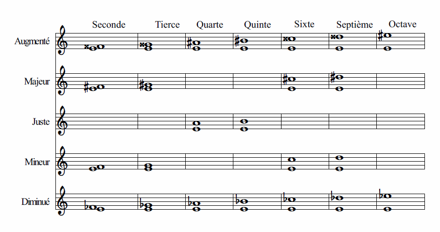 Intervalles occidentaux - Tableau